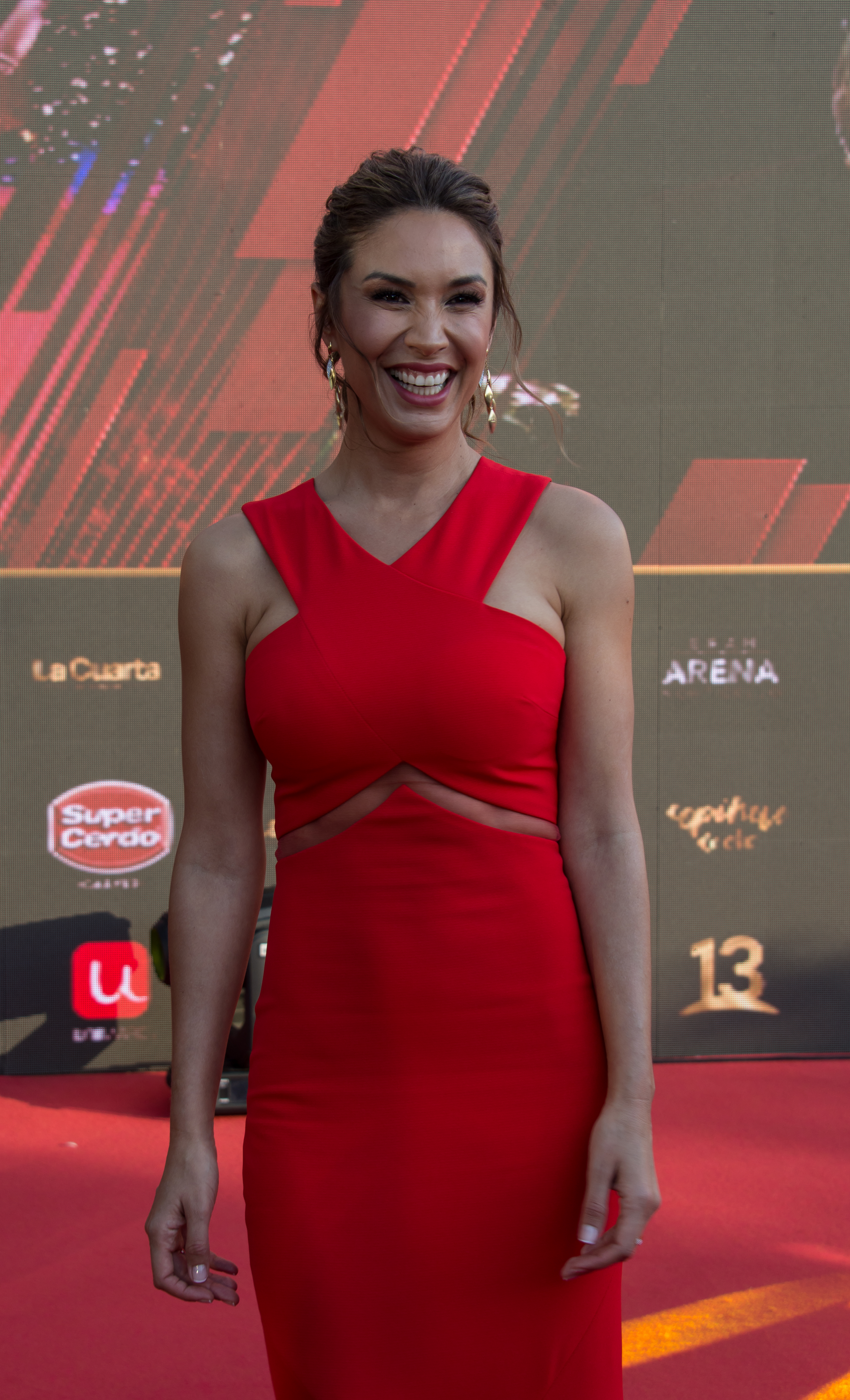 Vanesa Borghi, Copihue de Oro 2018, Sun Monticello, Mostazal, Región de O'Higgins, Chile